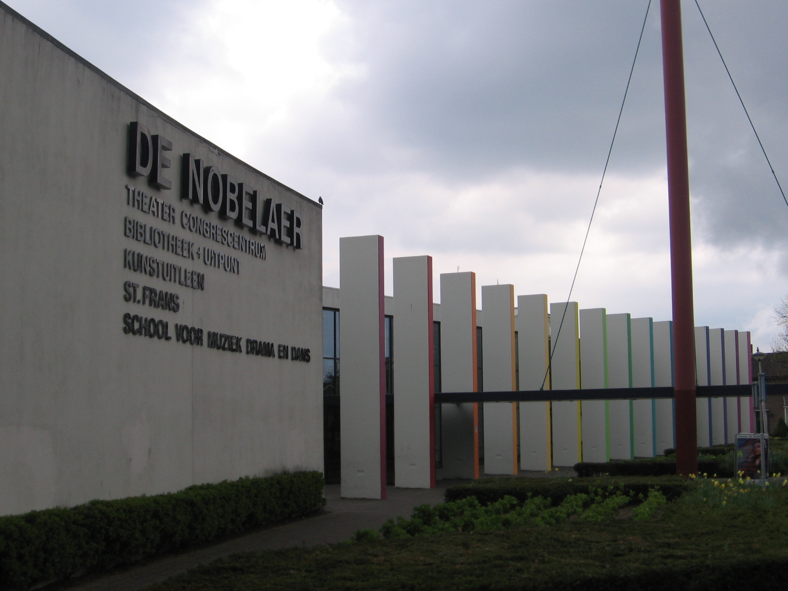 Etten-Leur, 30 april 2006